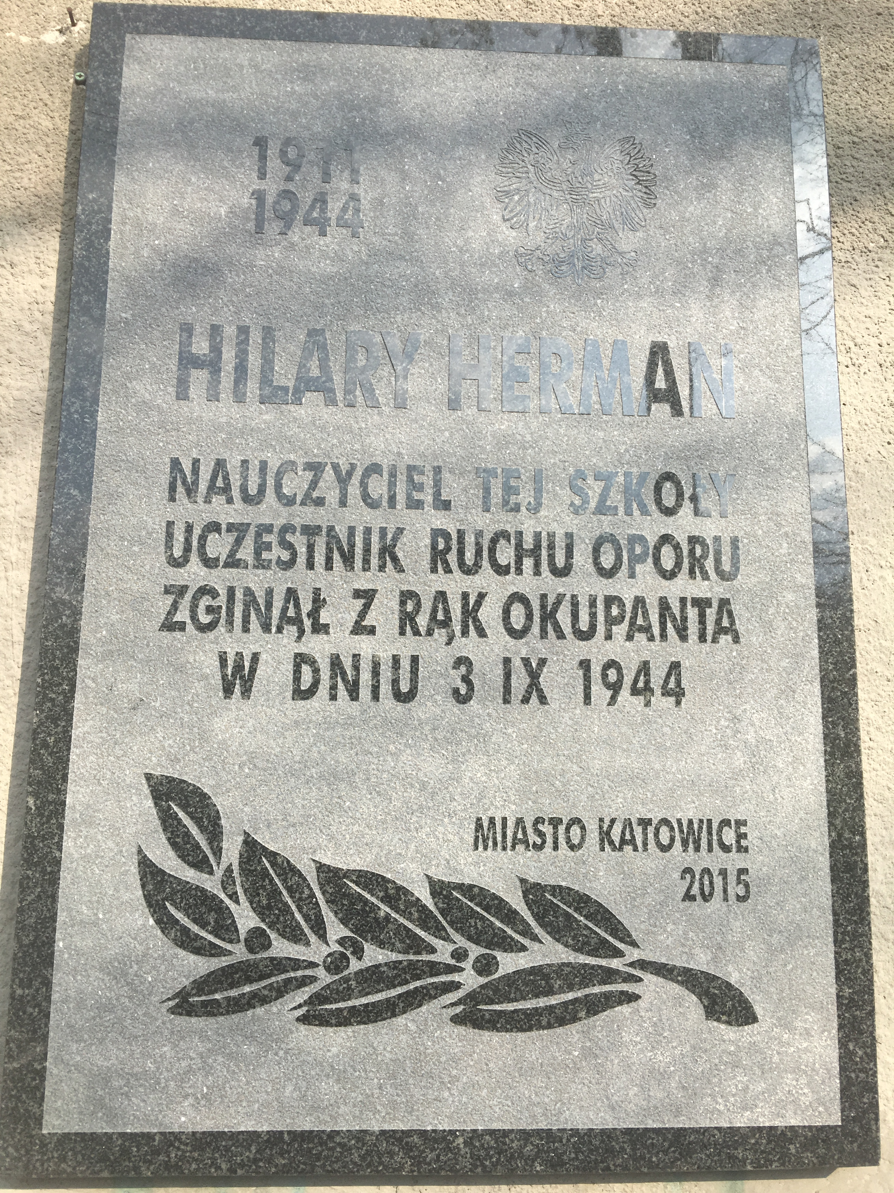 Tablica na V Liceum o Hilarym Hermanie - nauczycielu i wychowawcy, dyrygencie chóru „Słowik”, który zginął śmiercią męczeńską z rąk okupanta 3 września 1944 r.